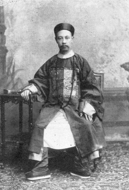 Quintin Quintana, chino que ayudo al general chileno Patricio Lynch, durante la Guerra del Pacifico.